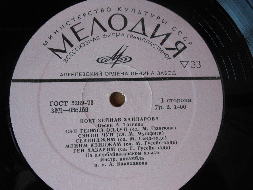 Zeynəb Xanlarovanın "Oxuyur Zeynəb Xanlarova" plastinkasının 1-ci üzü.